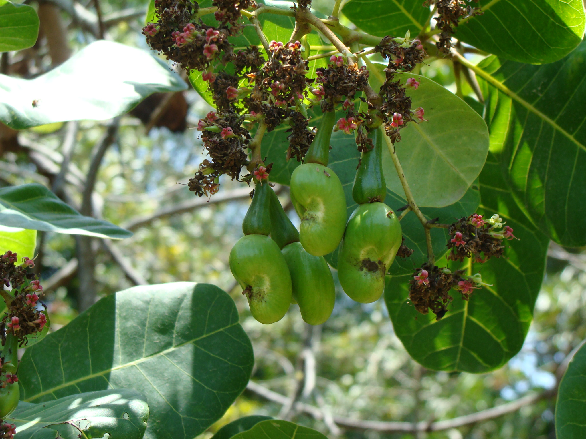 Semillas de merey con el pseudofruto todavía verde